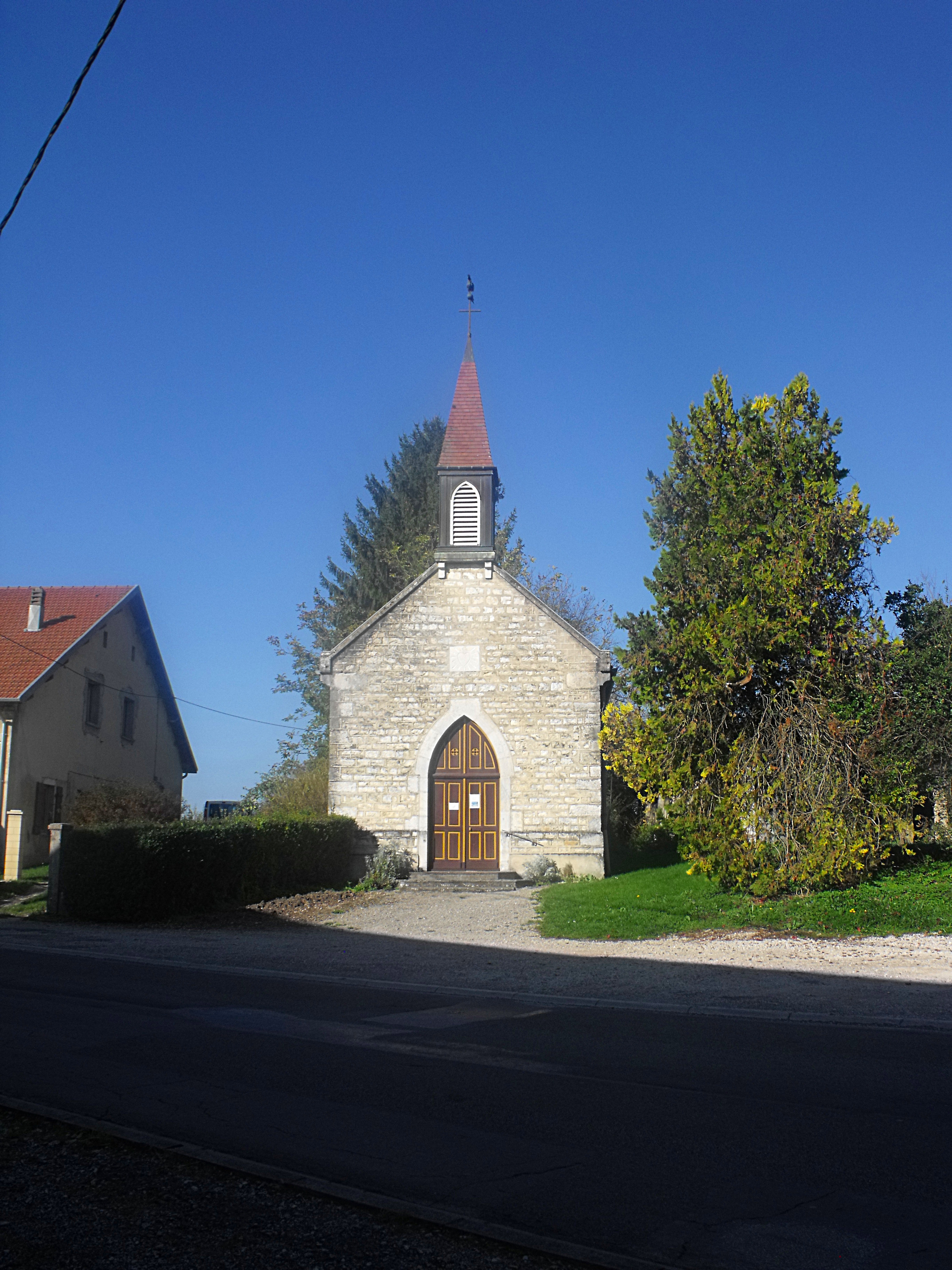 Chapelle à Arc et Senans, Doubs, France